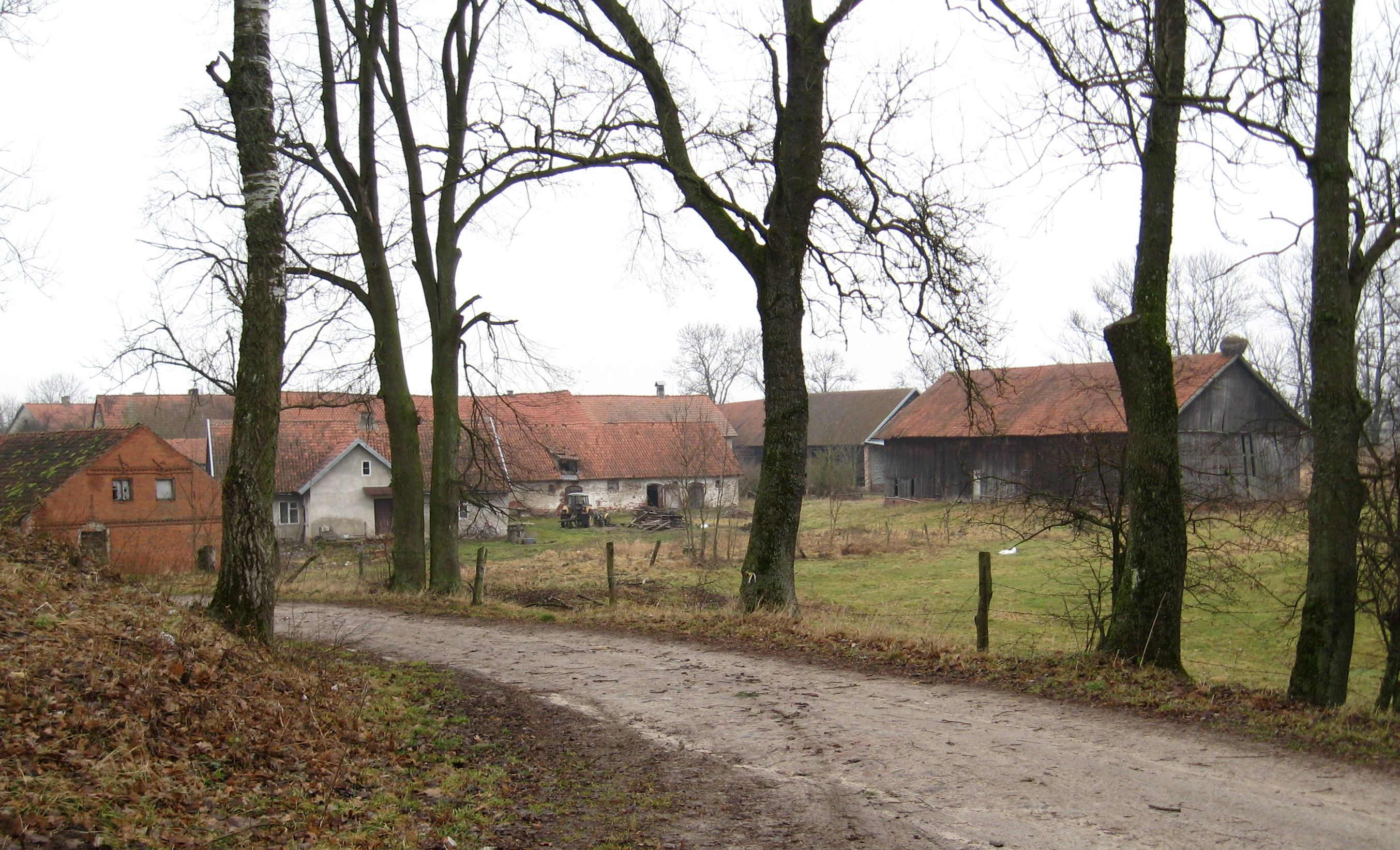 Radosze in Poland - OpenStreetMap (Info)